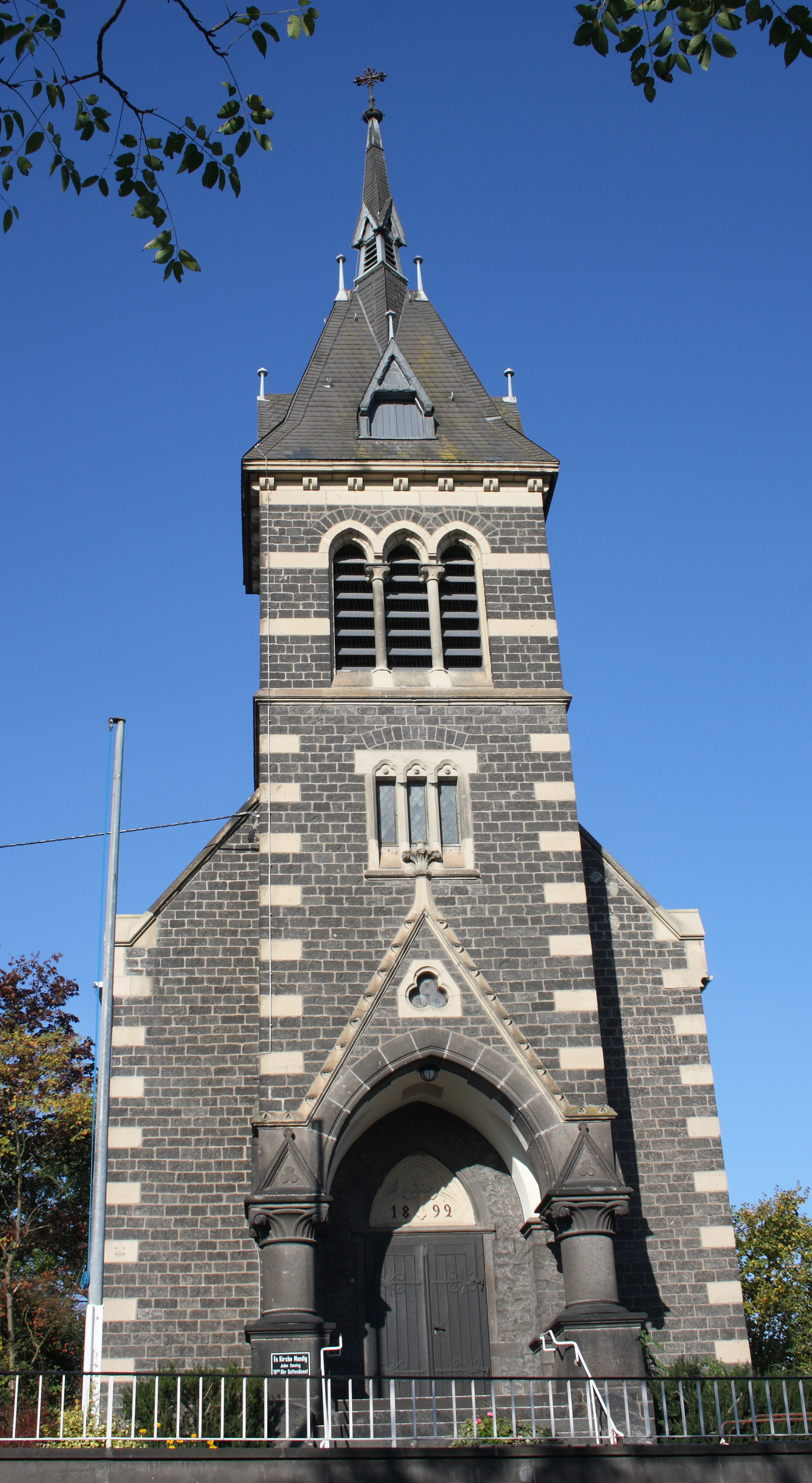 evangelische Pfarrkirche in Niedermendig, Ortsteil von Mendig